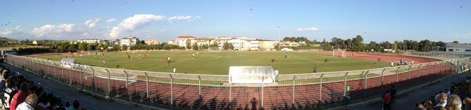 Il Campo Mirko Gullì, facente parte del complesso del PoliGiovino (Catanzaro), sede di allenamento dell'Unione Sportiva Catanzaro.